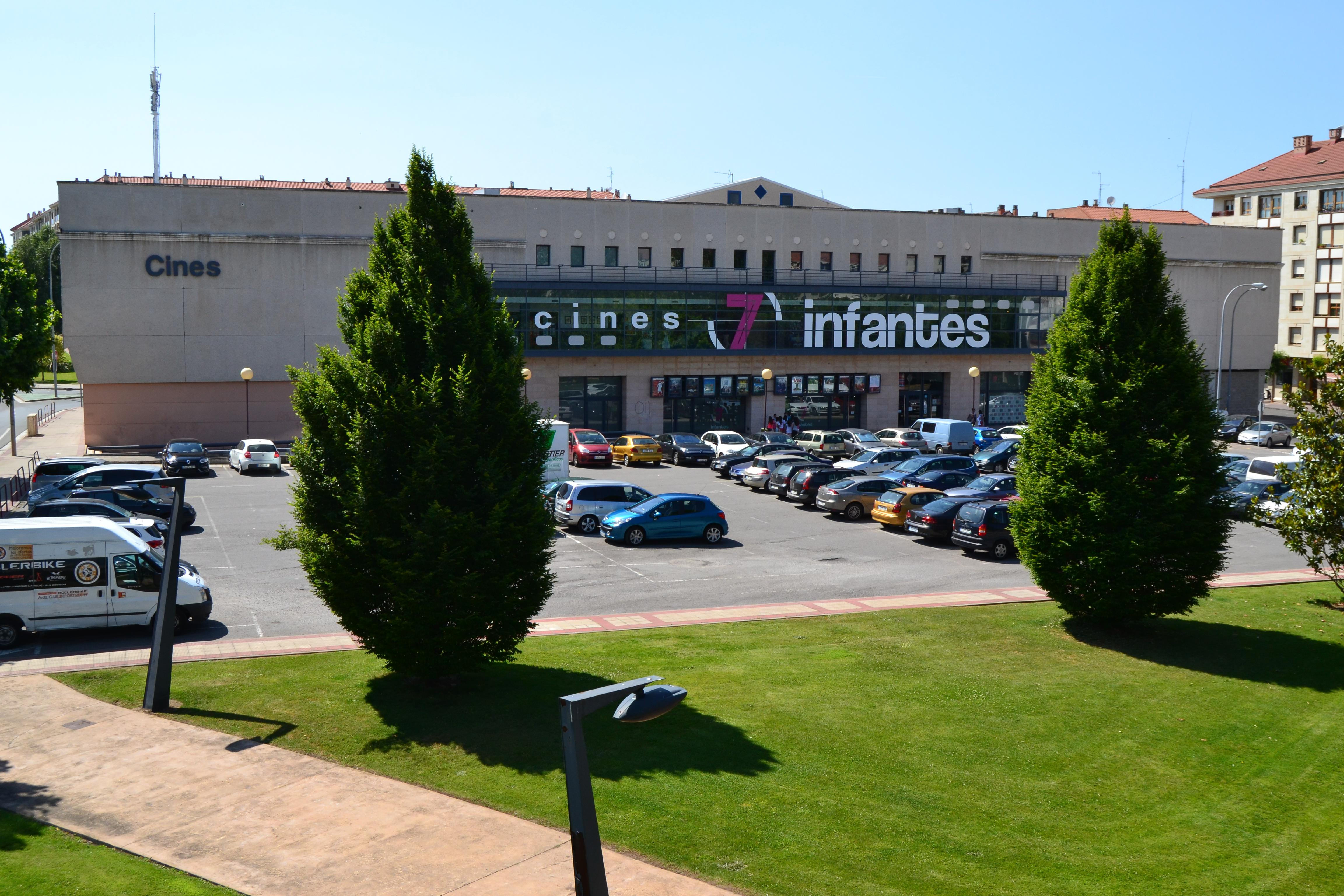 Es algo